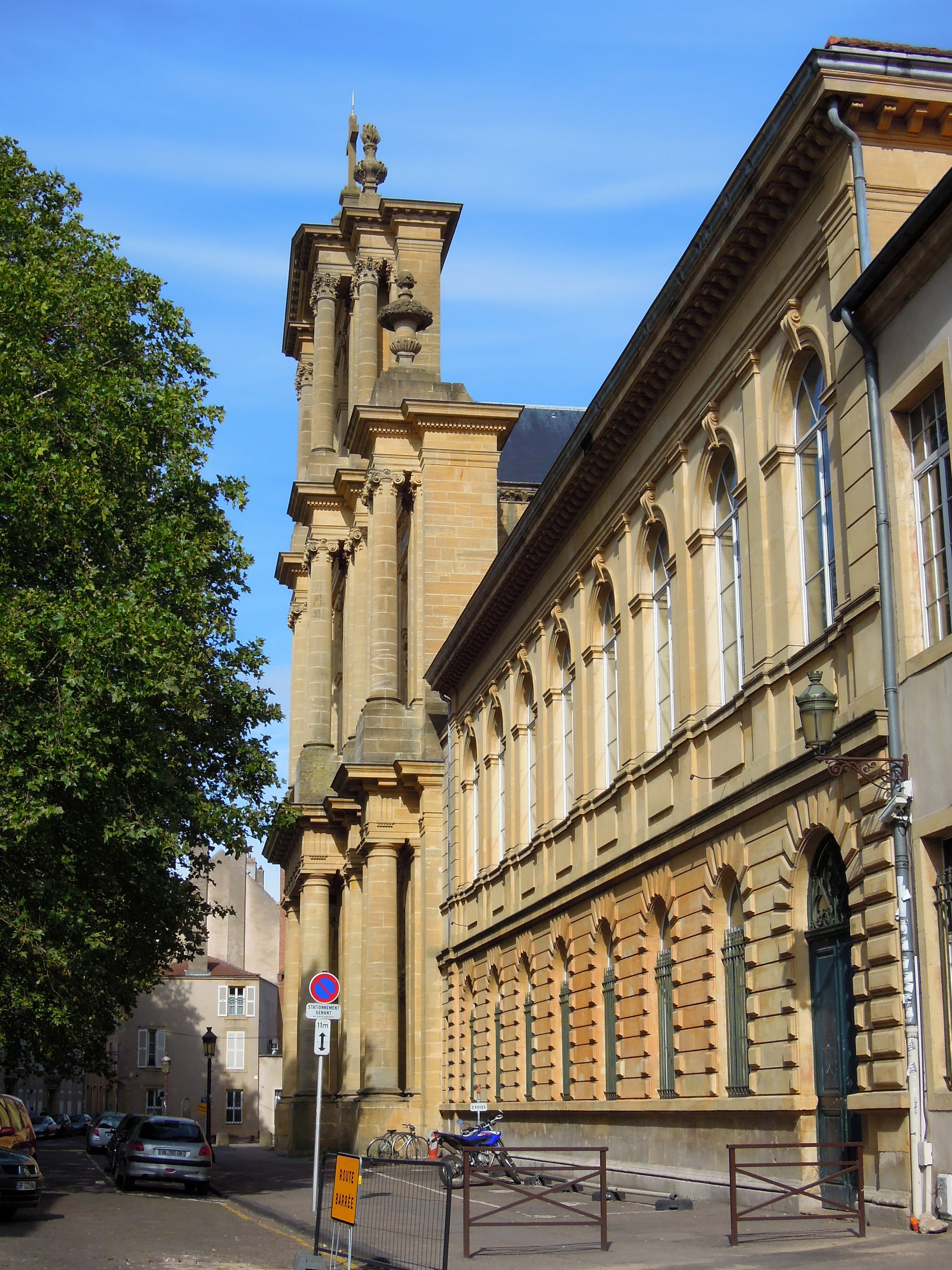 Place St Vincent. Lycée Fabert et façade de la basilique .